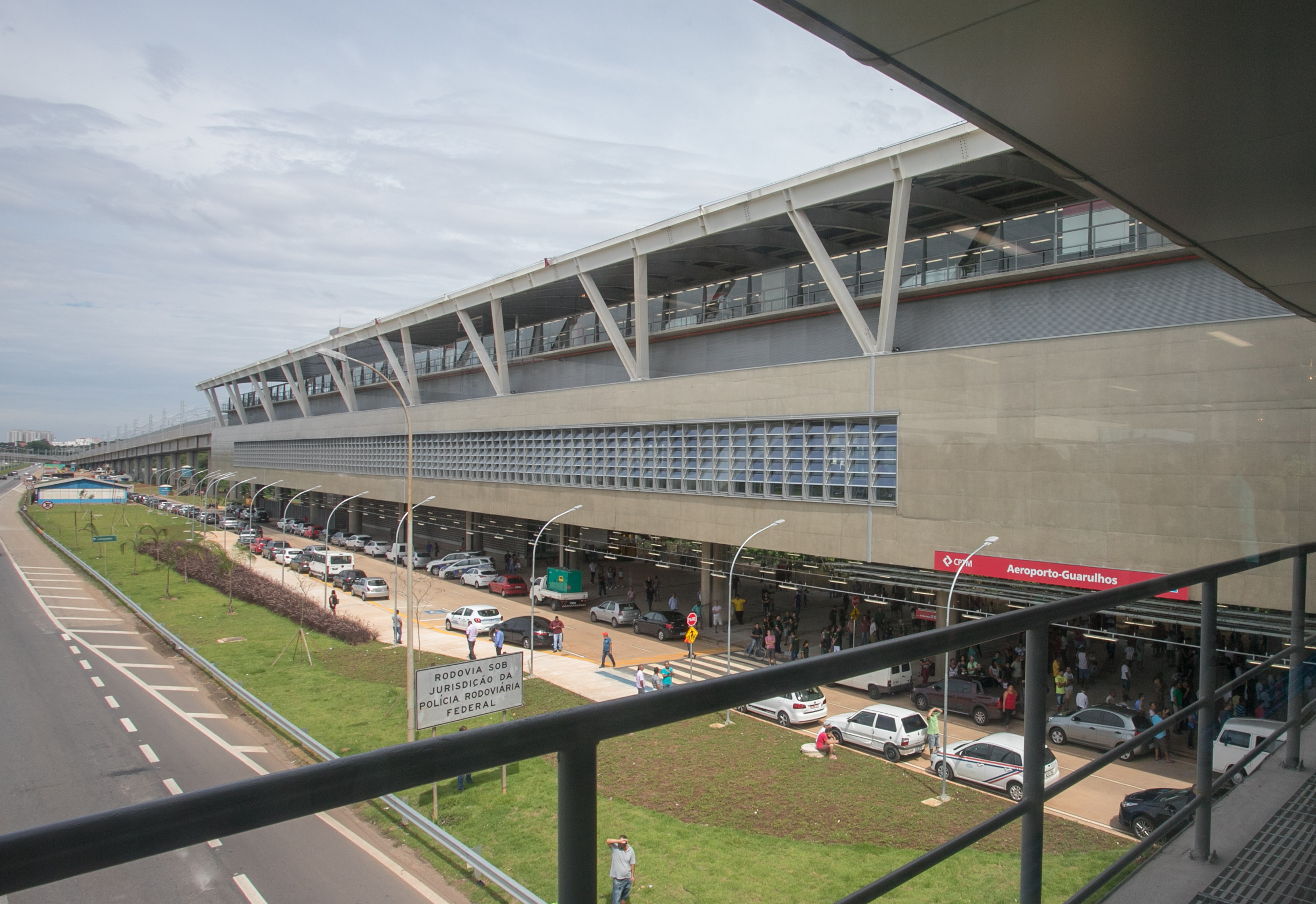 O governador do Estado de São Paulo, Geraldo Alckmin, entrega linha 13 Jade da CPTM em Guarulhos. Local: Guarulhos/ SP Data: 31/03/2018 Foto: Governo do Estado de São Paulo